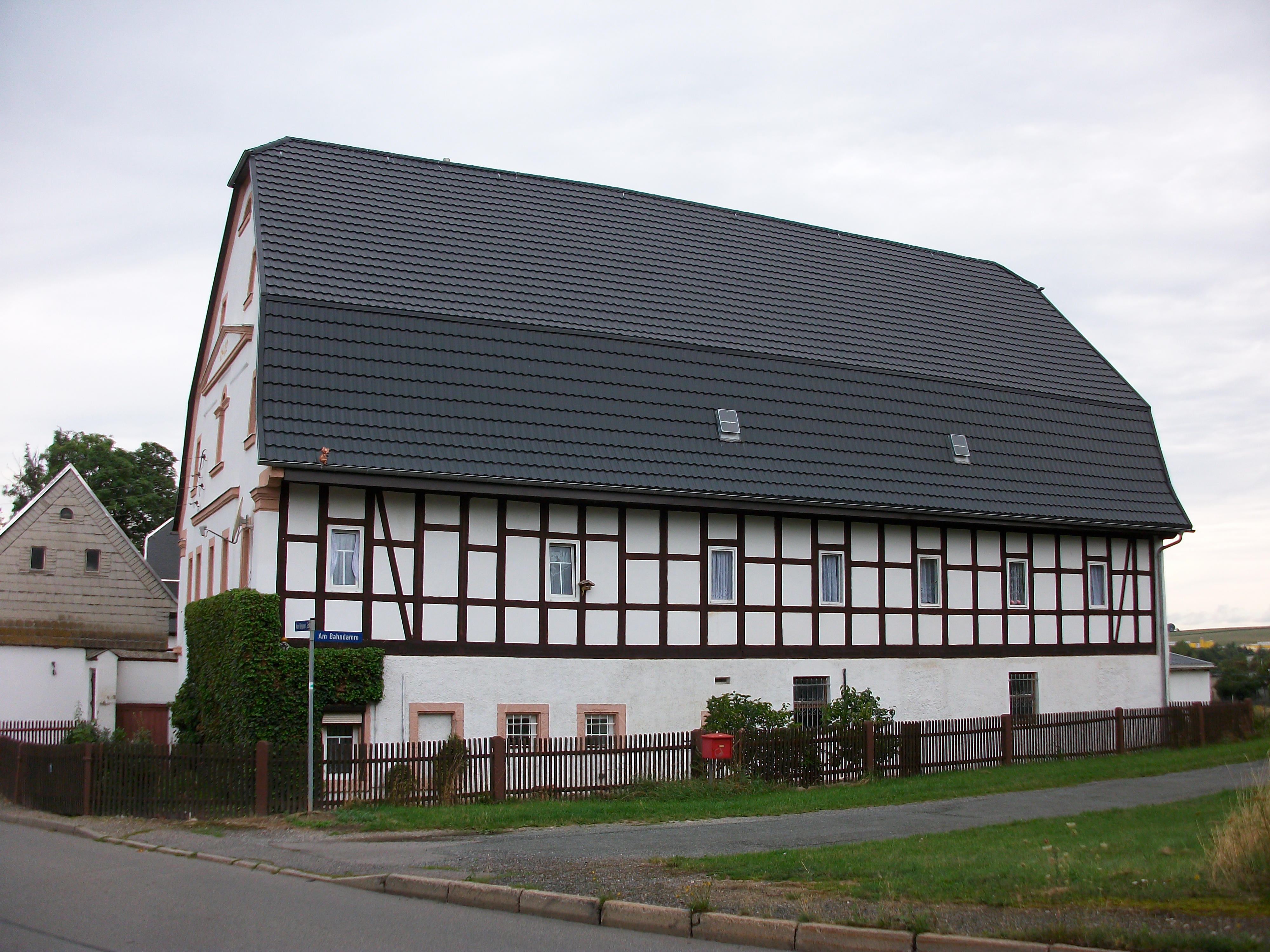 Reinholdshain, Am Relsner Eck 15